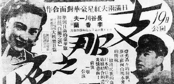 中文（台灣）: 代表「滿洲國」的山口淑子 / 李香蘭